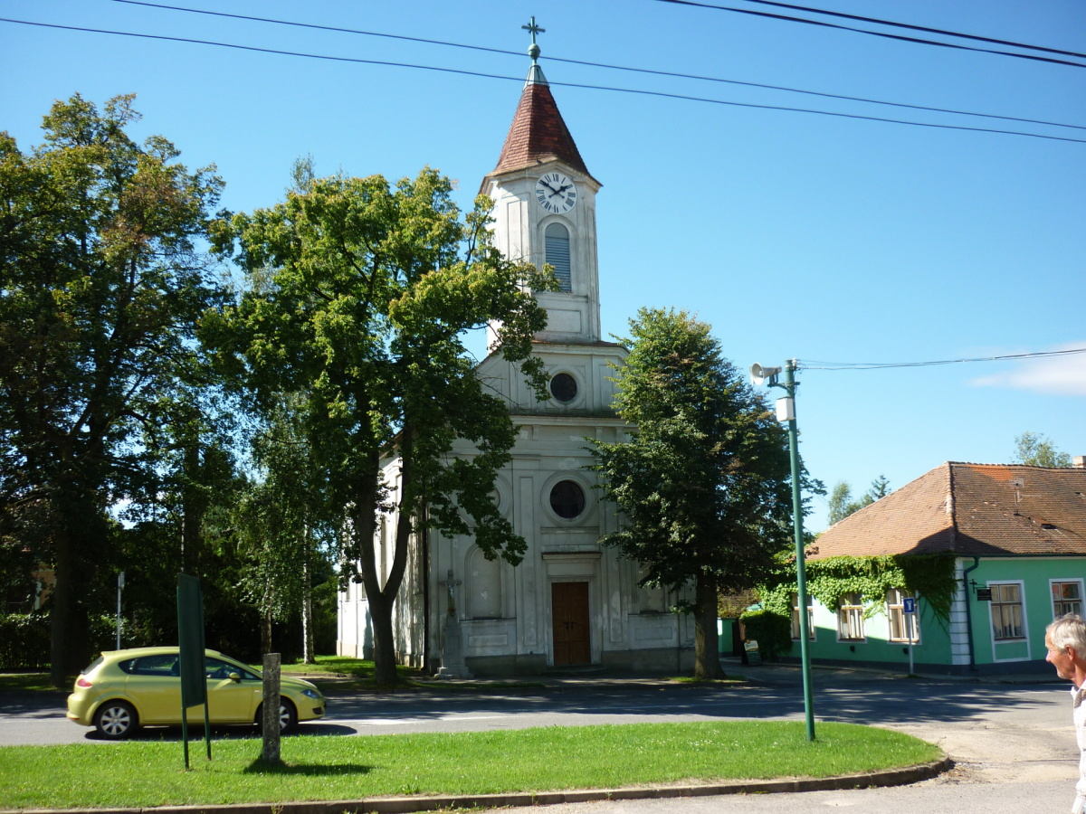 Kostel svaté Terezie v Lesné